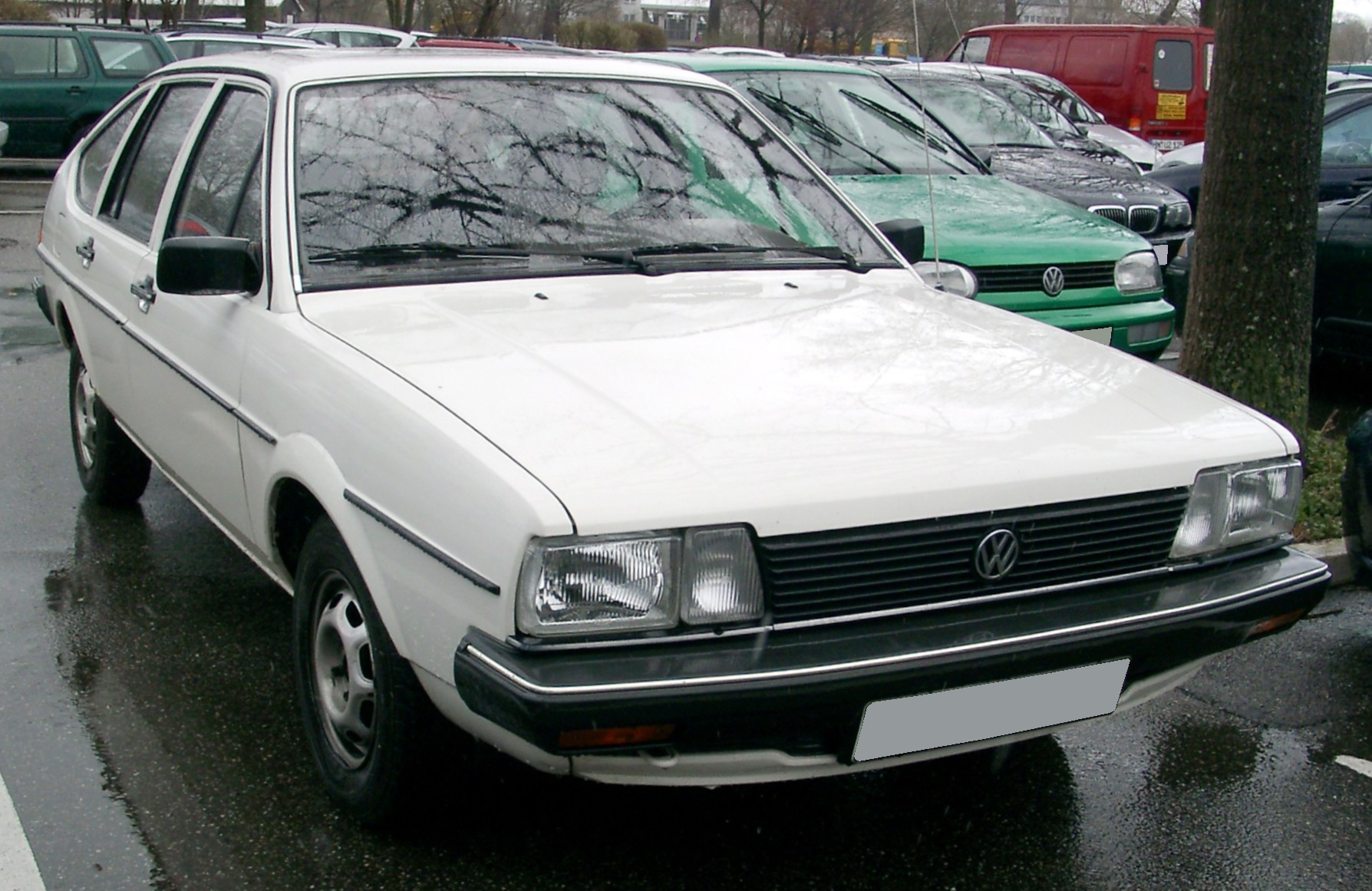 VW Passat B2